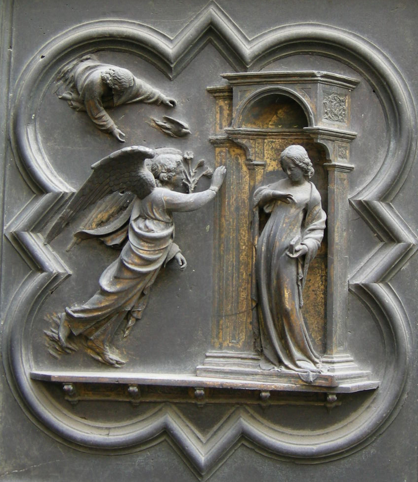 1 Annunciazione2